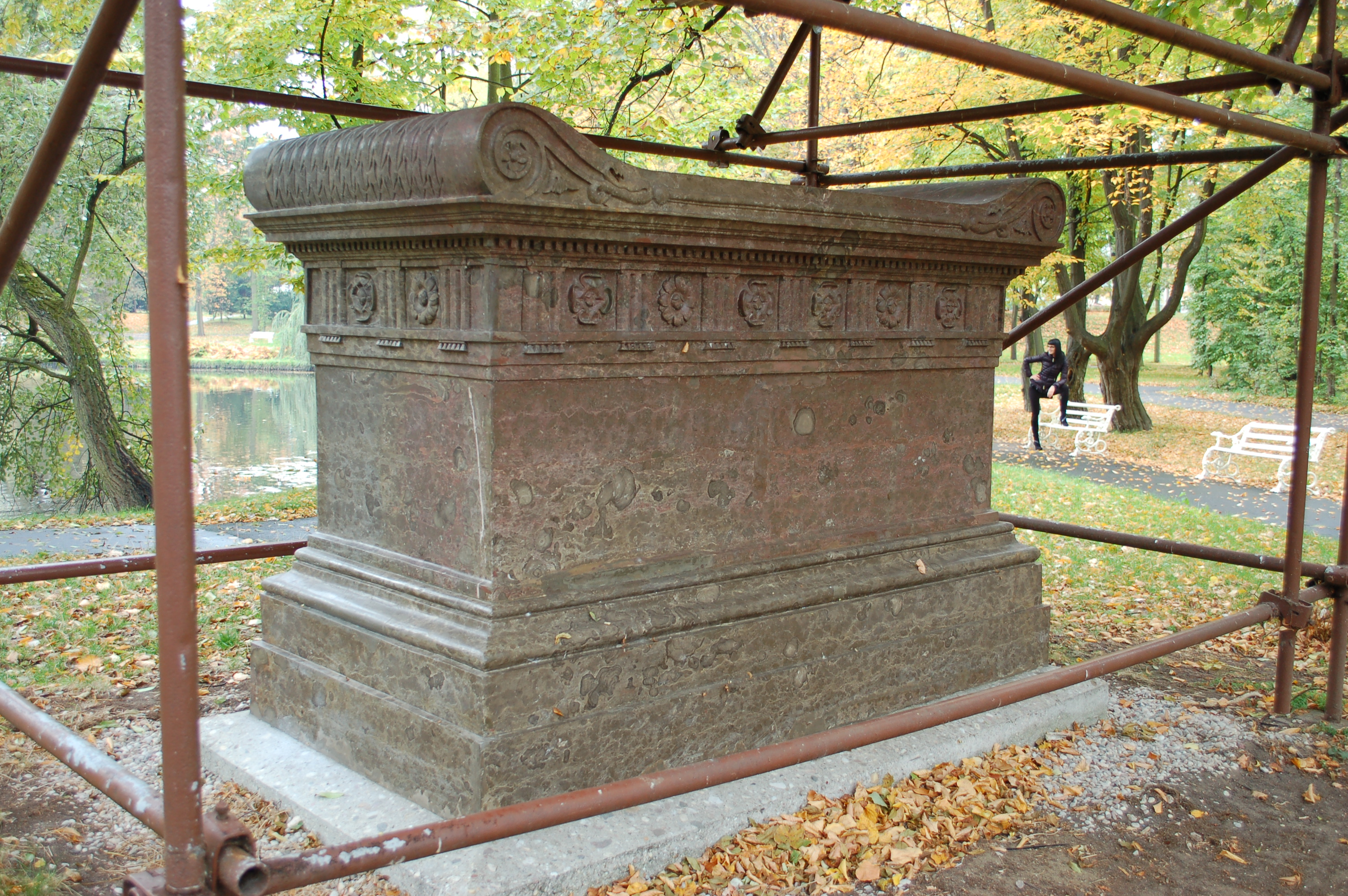 Wilanów